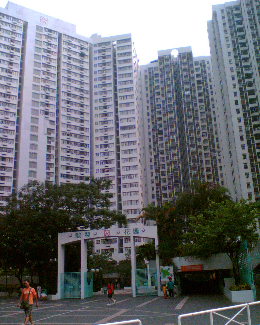 駿發花園